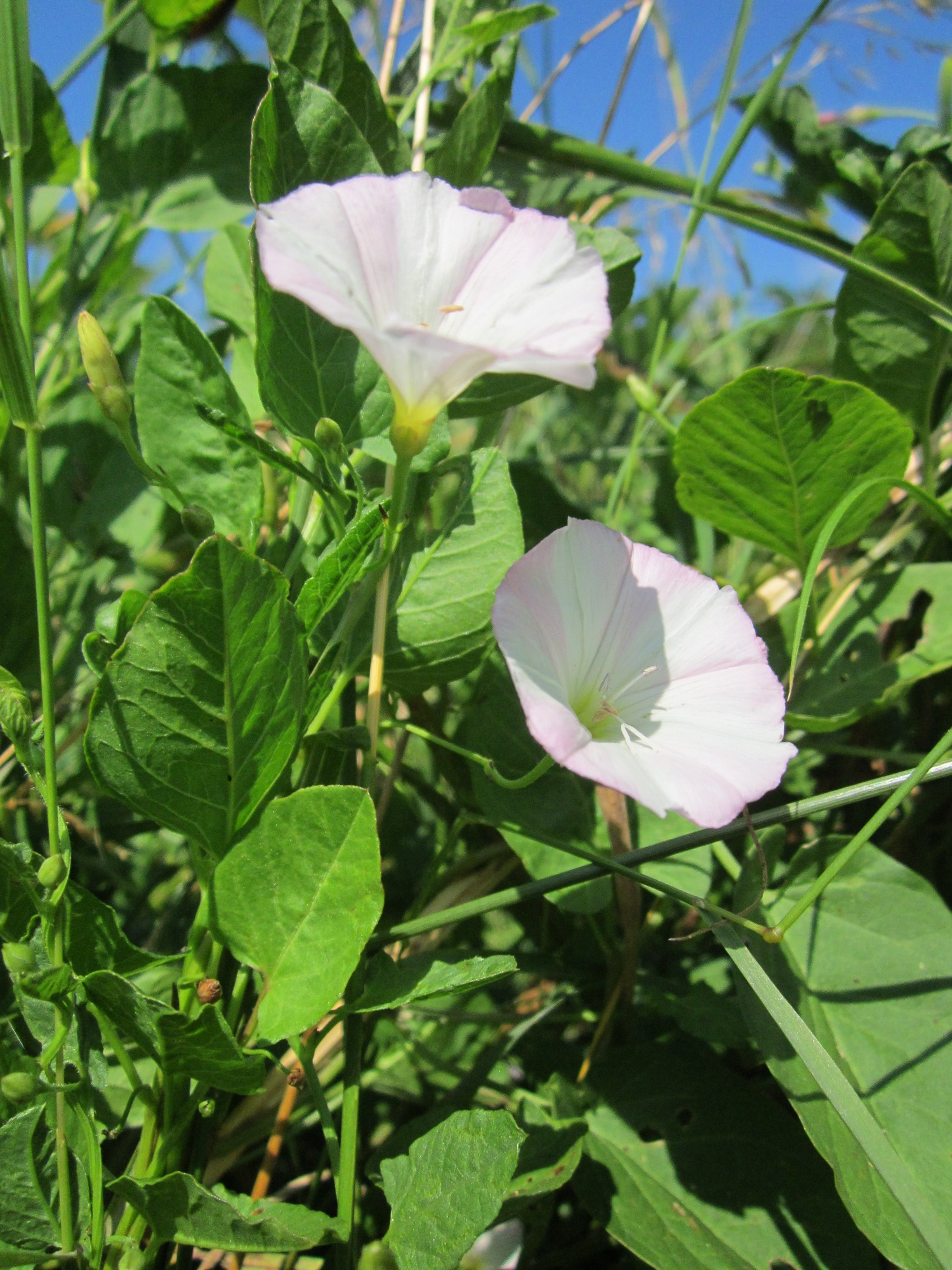 Ackerwinde (Convolvulus arvensis) im Naturschutzgebiet "St. Arnualer Wiesen"